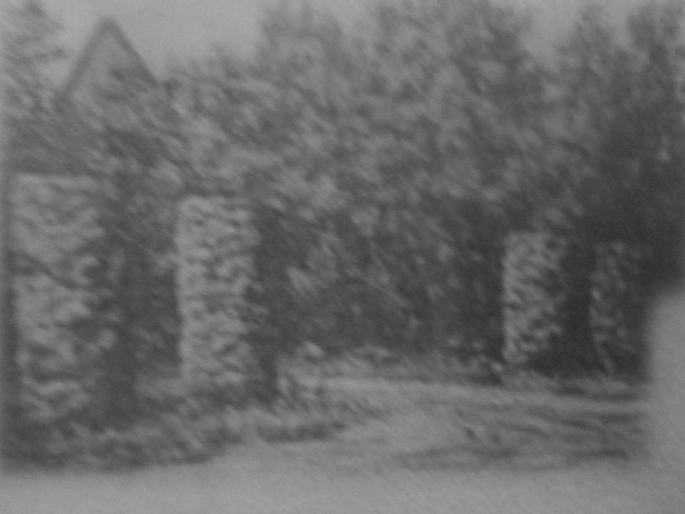 сааас